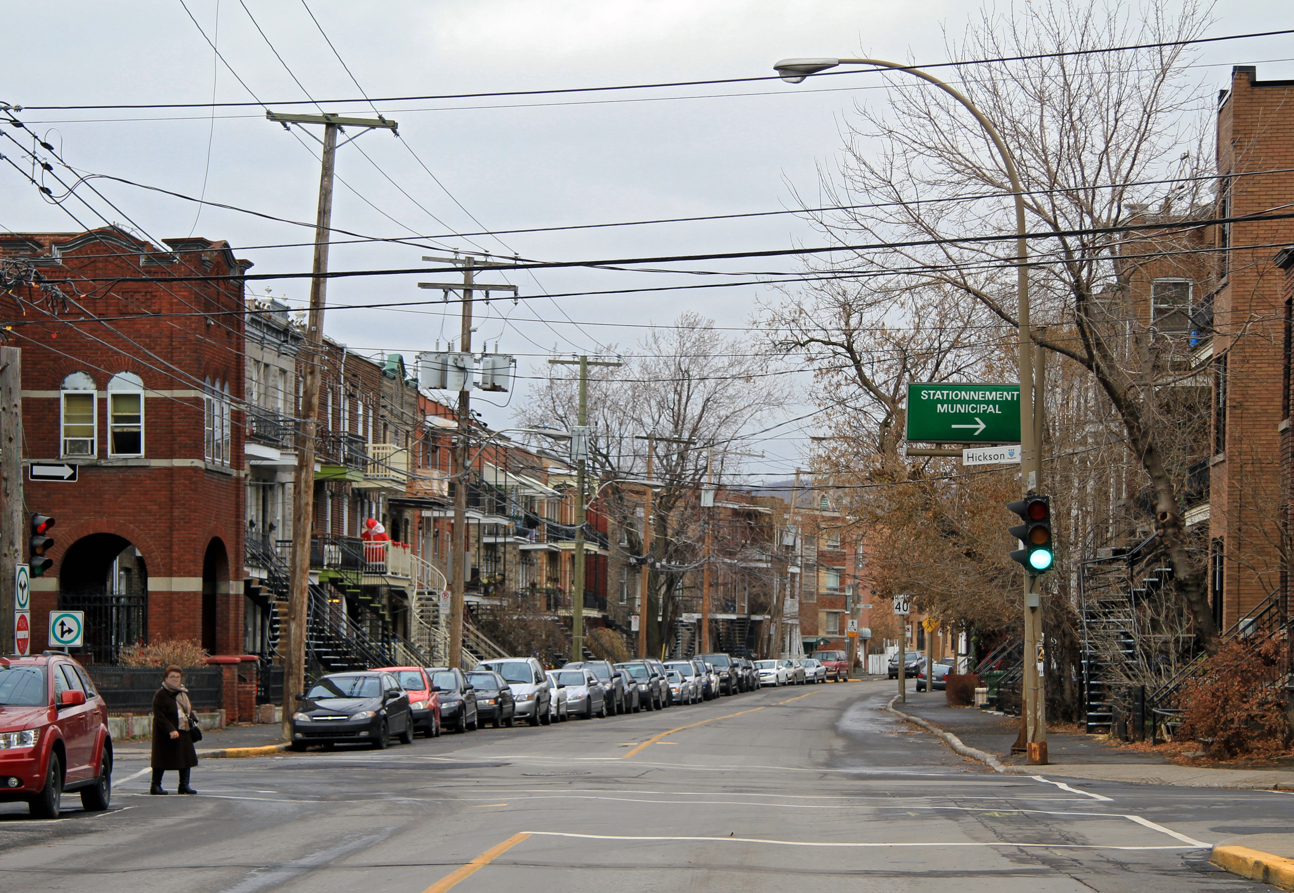 Boulevard Lasalle à Verdun au croisement de la rue Hickson